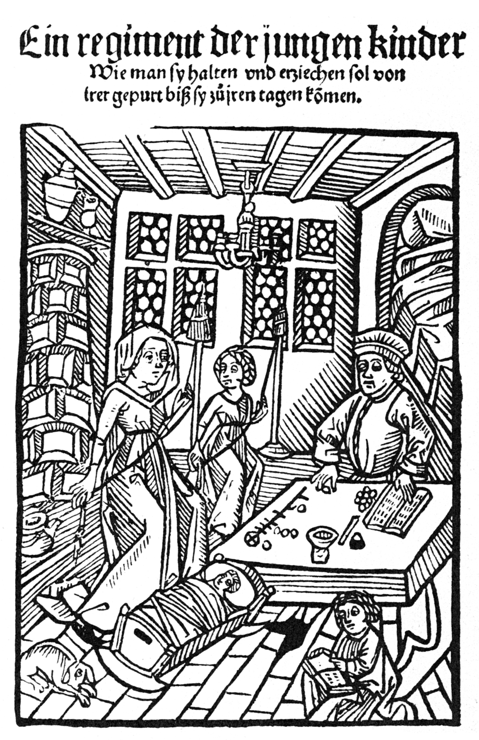 Titelbild